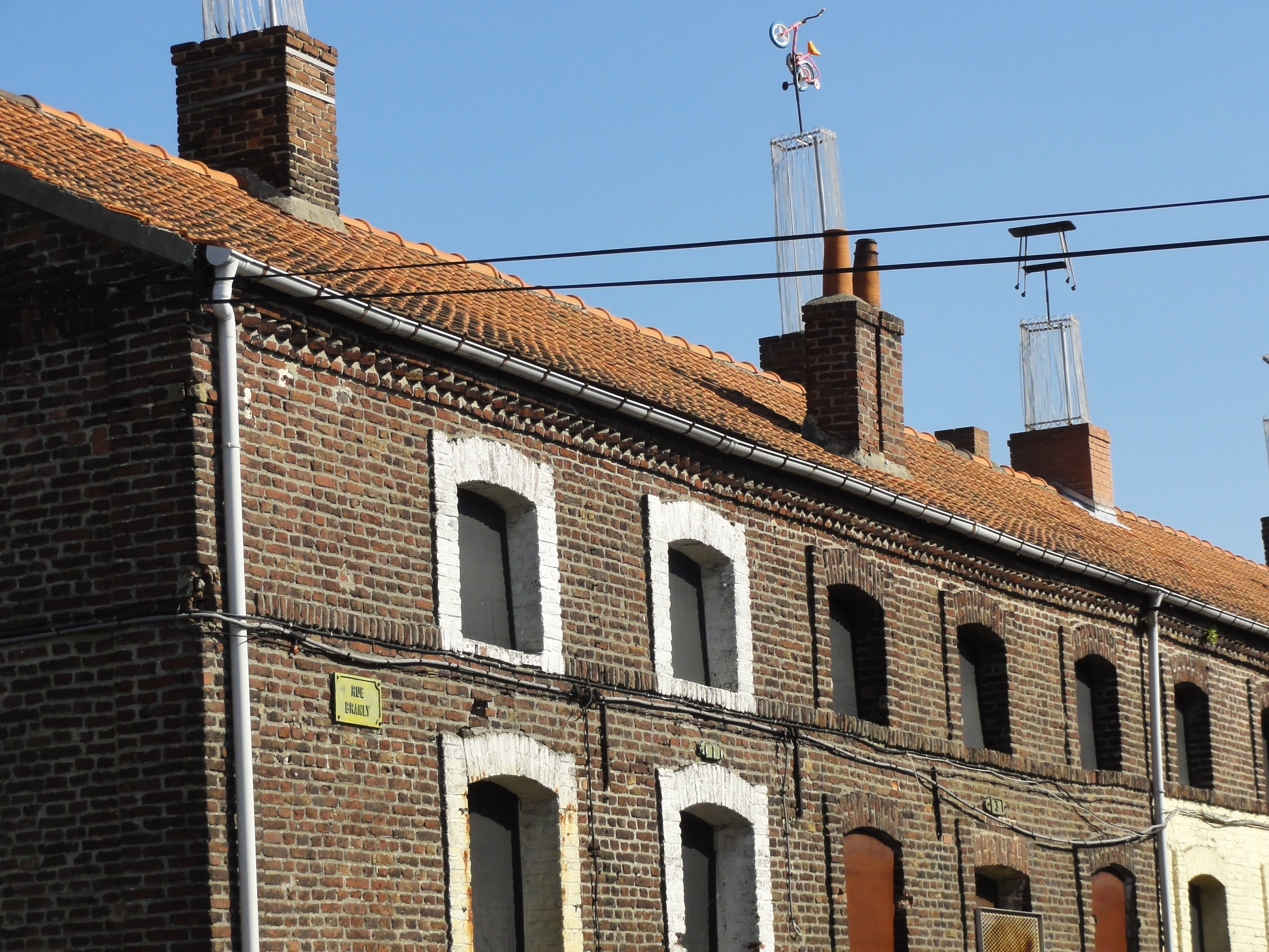 Cité des Électriciens ou no 2 de la Fosse n° 1 - 1 bis de la Compagnie des mines de Bruay, Bruay-la-Buissière, Pas-de-Calais, Nord-Pas-de-Calais, France. .